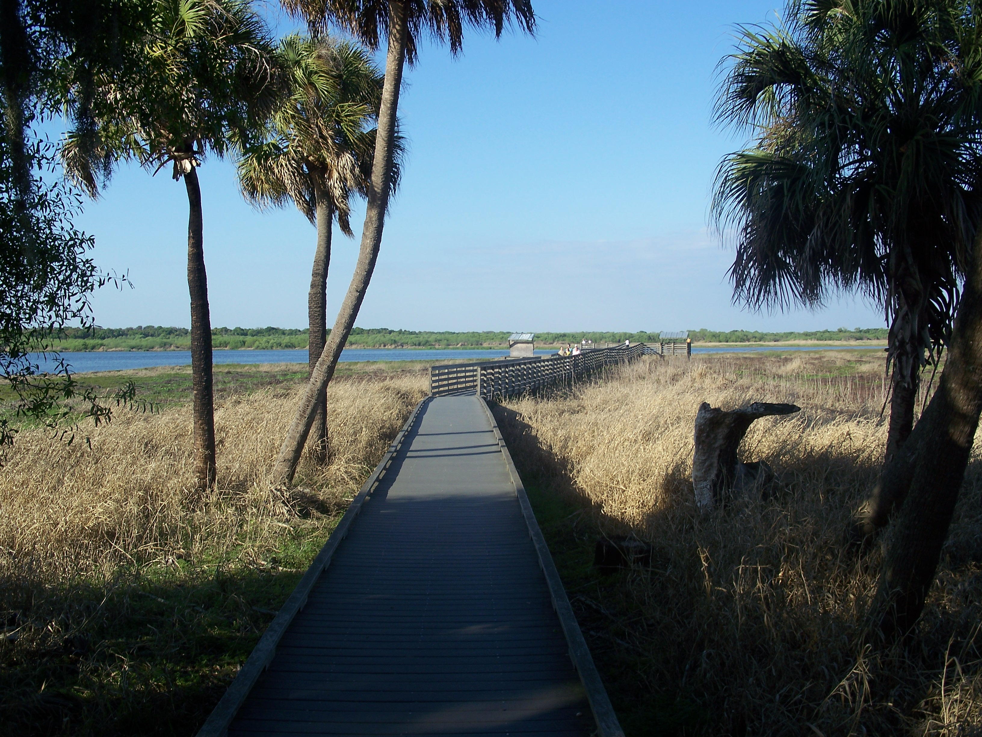 Myakka River State Park: Birdwalk